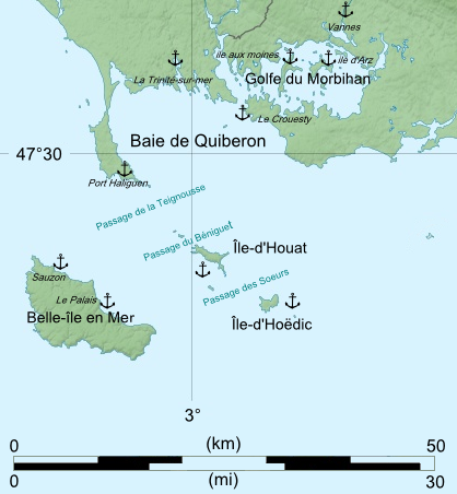 Carte de la côte Sud Morbihan: Baie de Quiberon